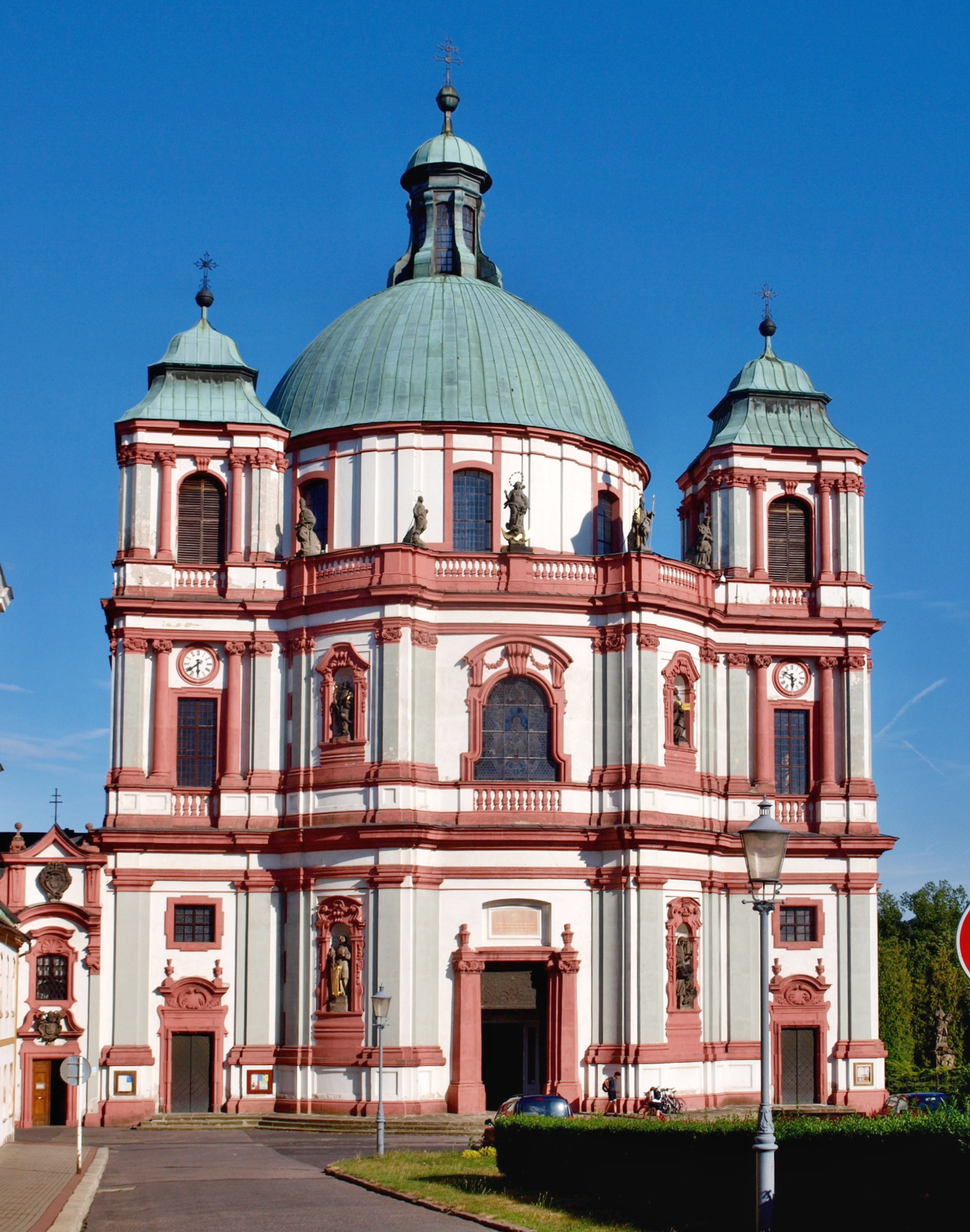 Basilica minor - Kostel sv. Vavřince a sv. Zdislavy v Jablonném v Podještědí